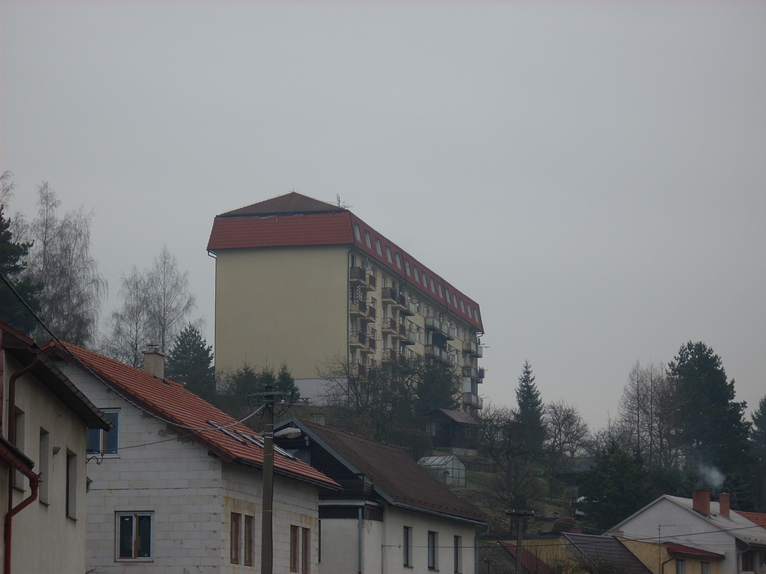 Panelák, Na Podhoře, Polná